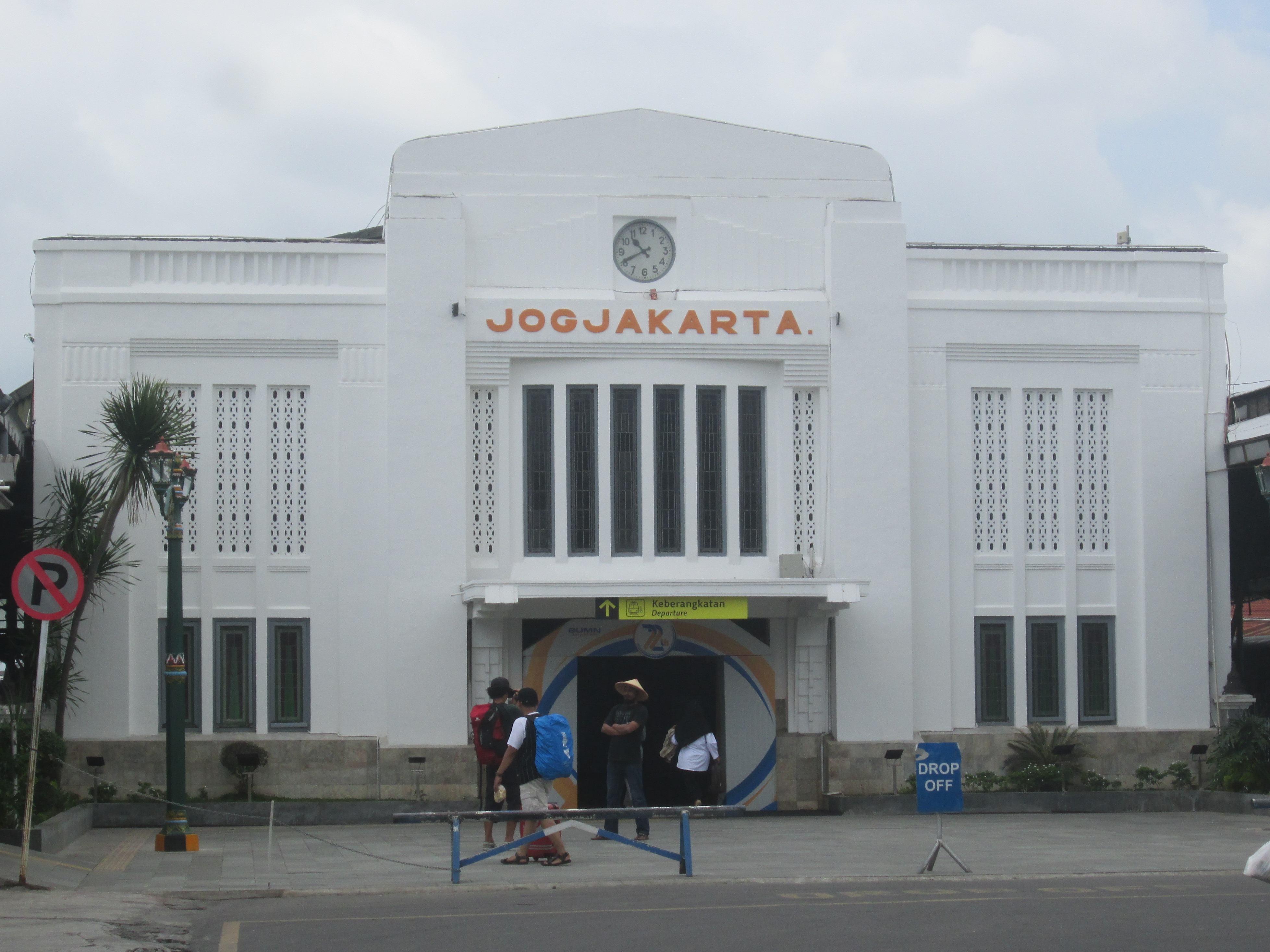 Stasiun Tugu, setelah menggunakan papan baru seperti layaknya bandara.